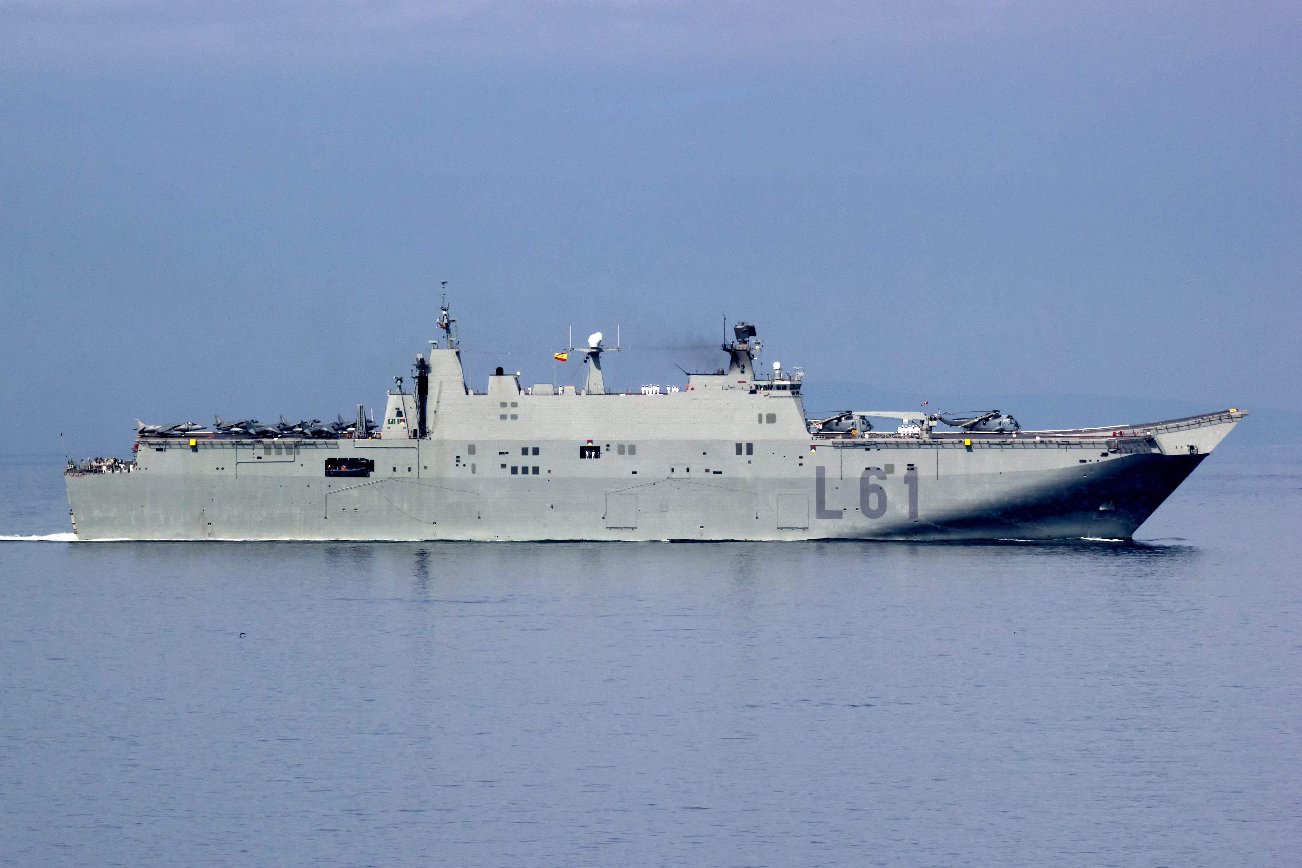 O portaavións L61 Juan Carlos I participando na parada naval do 300 aniversario da Real Compañía de Guardamarinas na Escola Naval de Marín.